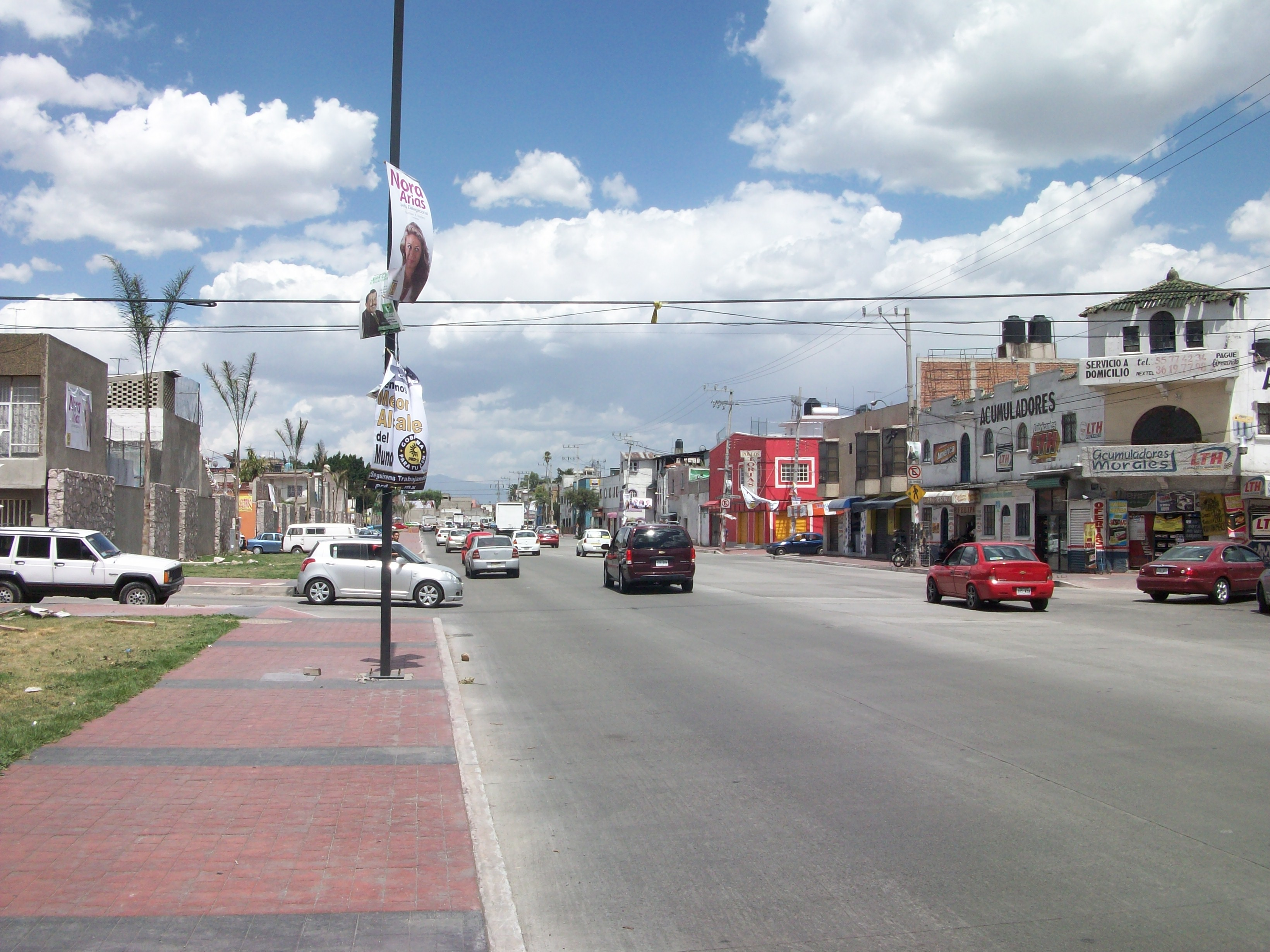 Avenida Euzkaro